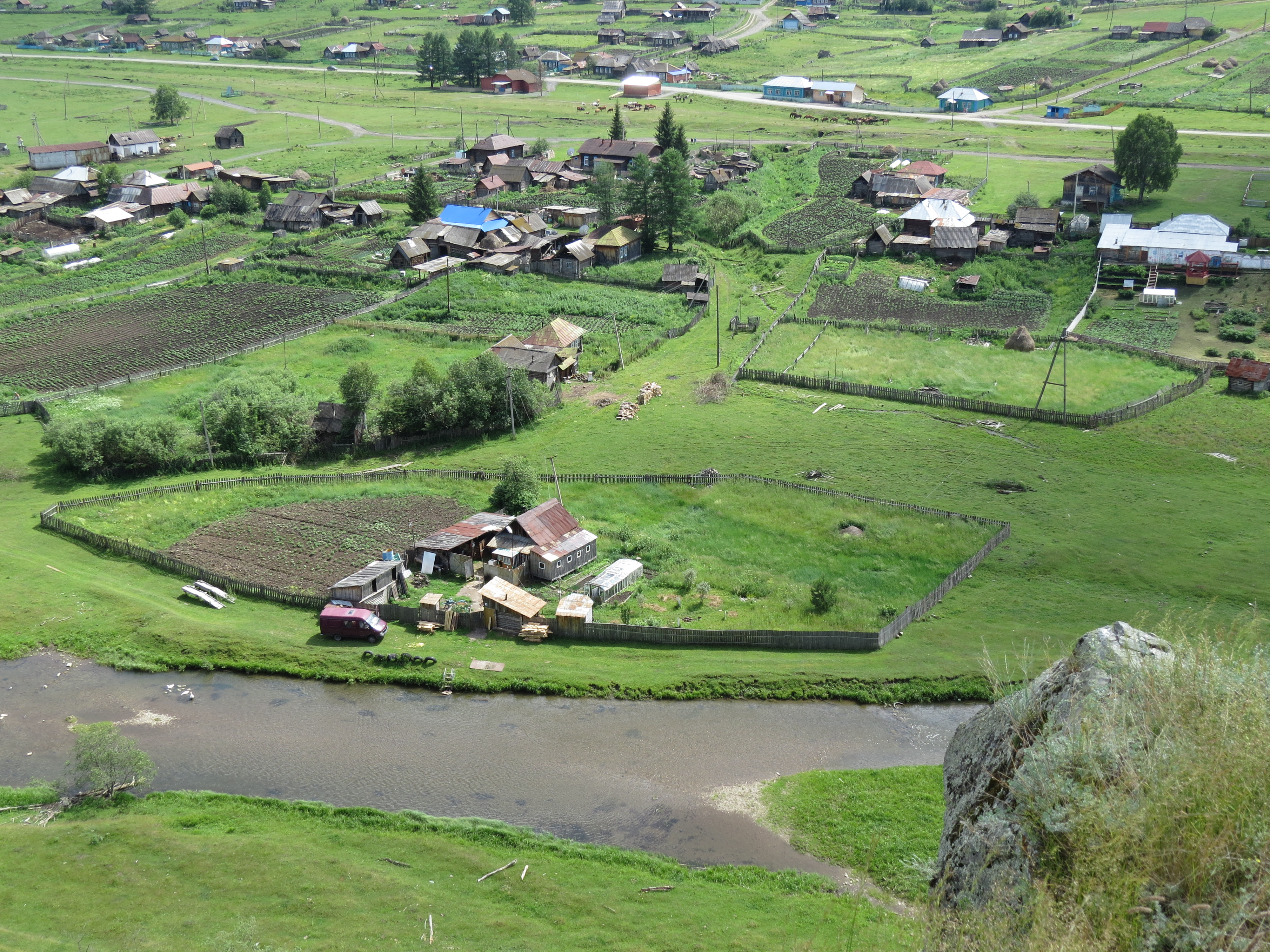 Ишля.